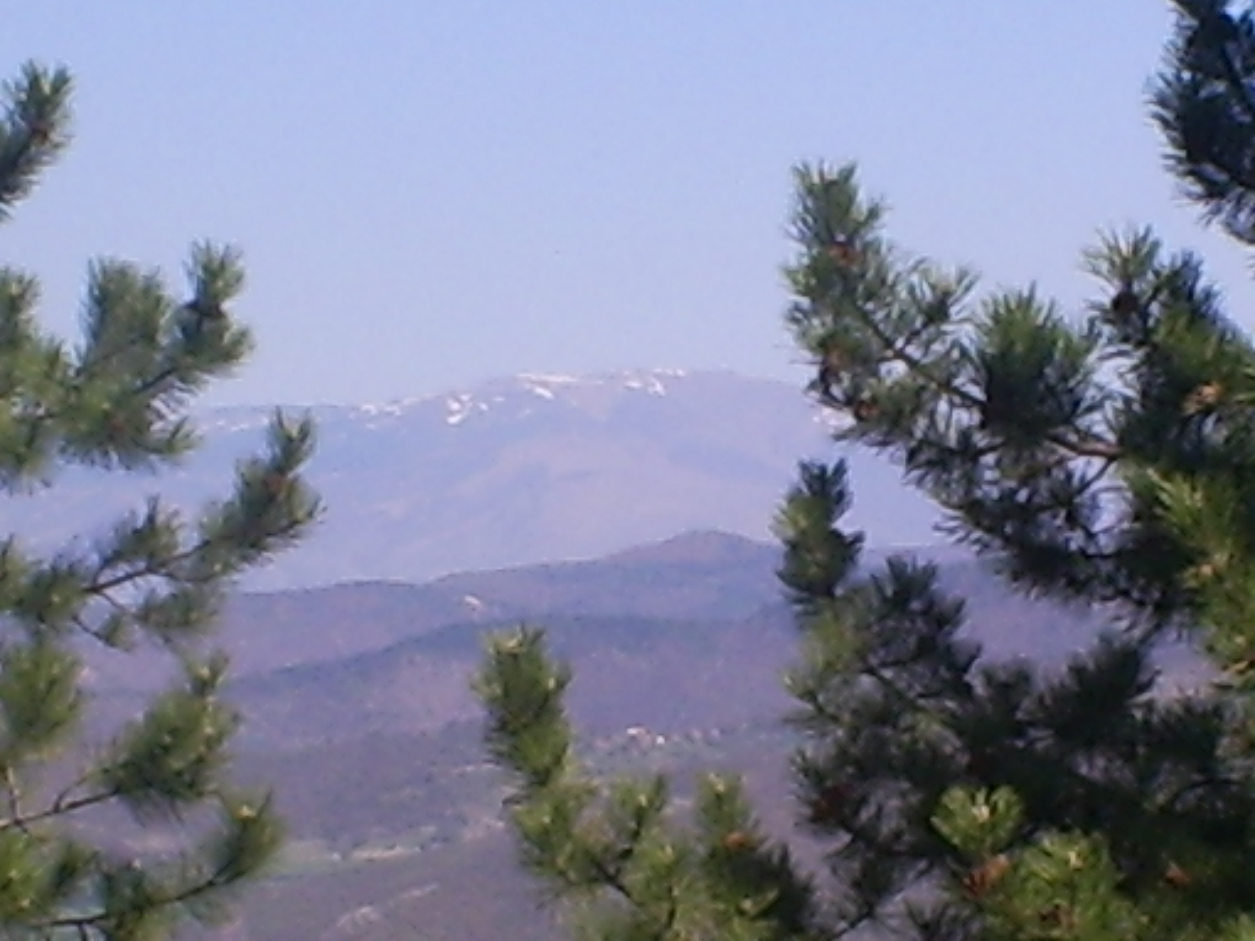 Pancicev vrh - pogled sa manastira Djurdjevi stupovi